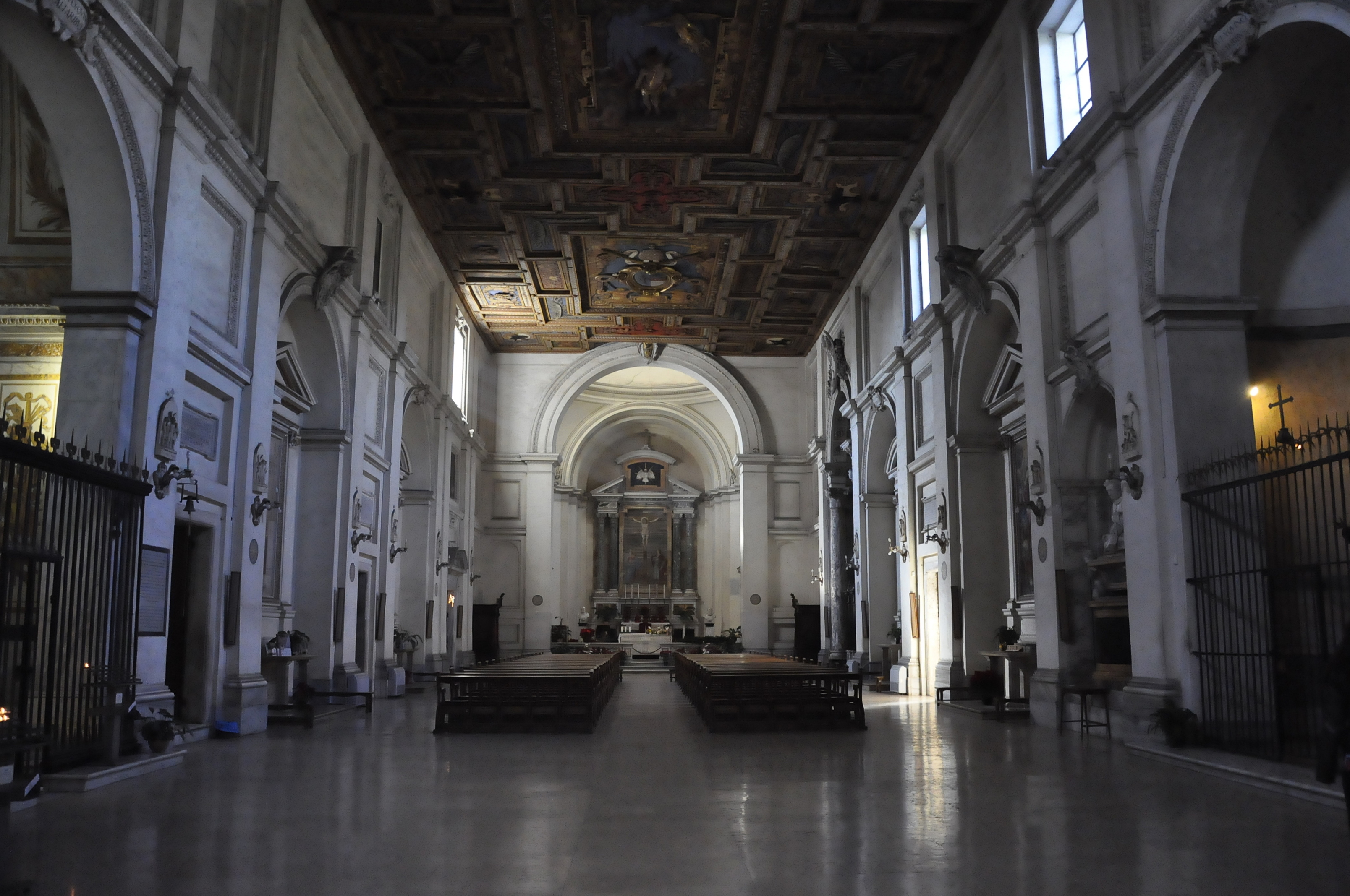 Sint-Sebastiaan buiten de Muren, langs de Via Appia, te Rome